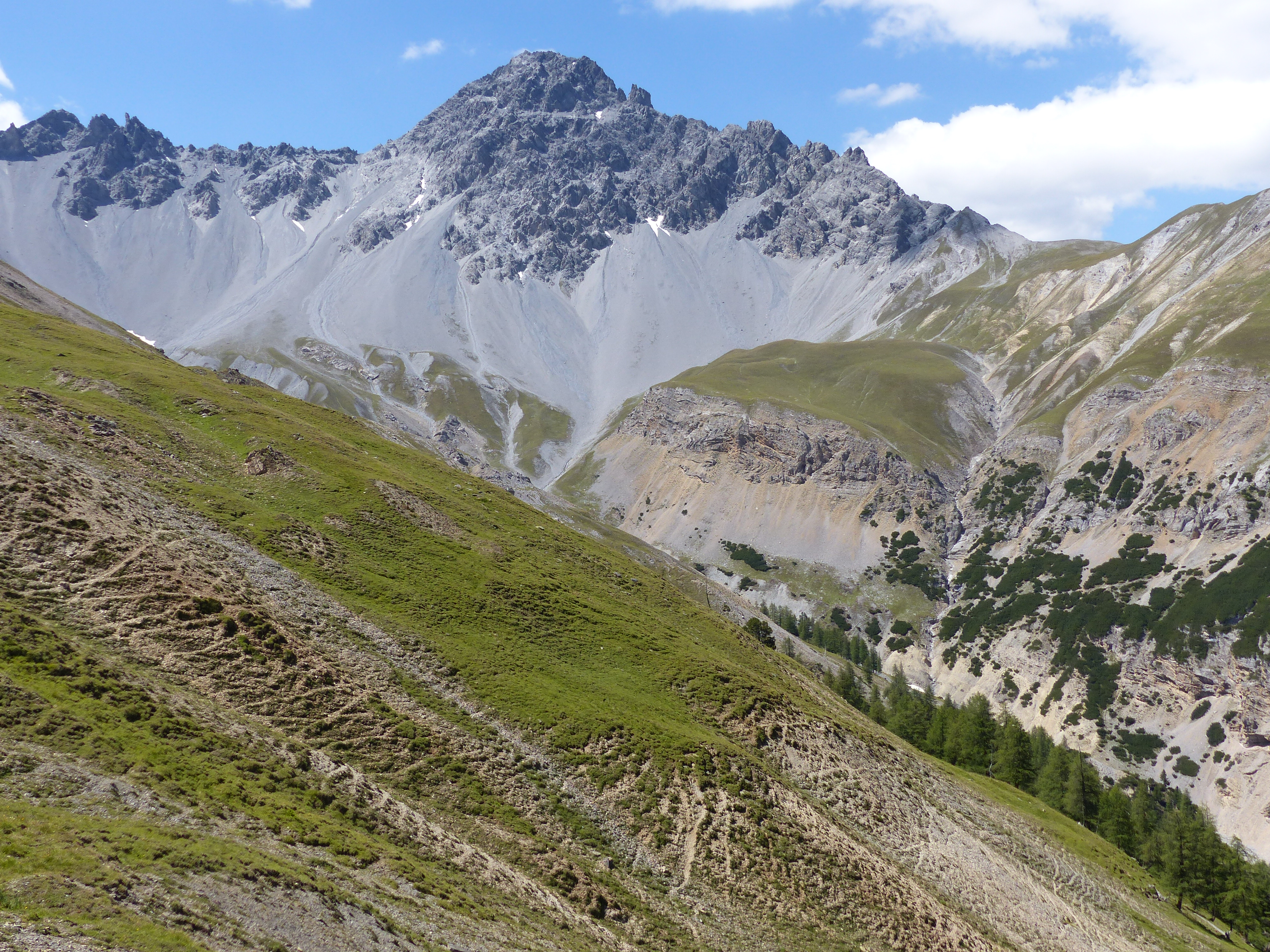 Piz Foraz (fotografiert vom Sattel nördlich des Mot Tavrü). Davor liegt das Val Foraz